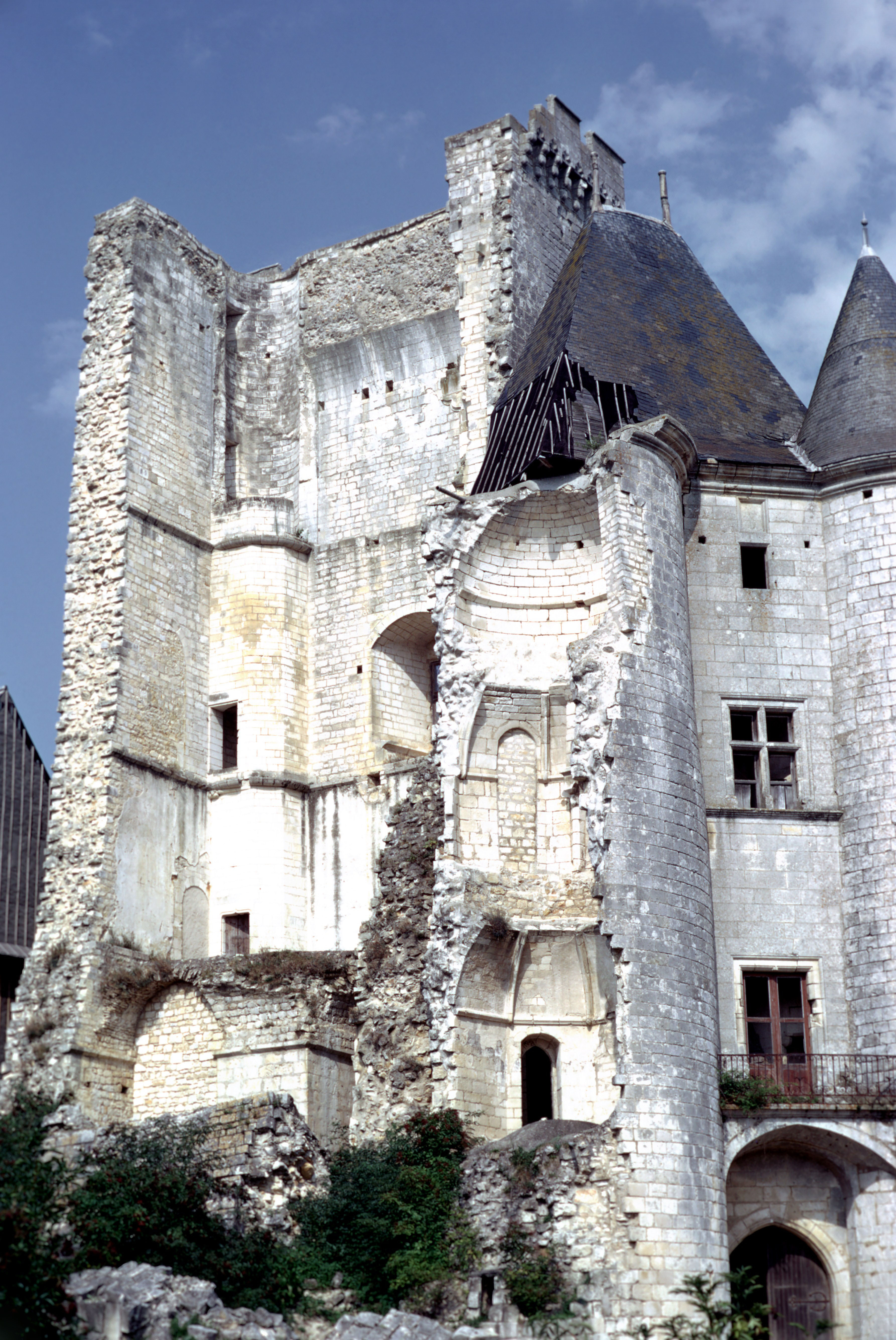 La Tour Carrée (donjon) et les Tours Jumelles. En 1960 le pan ouest du donjon s'effondra, entraînant avec lui une partie de la tour jumelle de gauche qui le jouxtait. La Rochefoucauld, Charente, France.